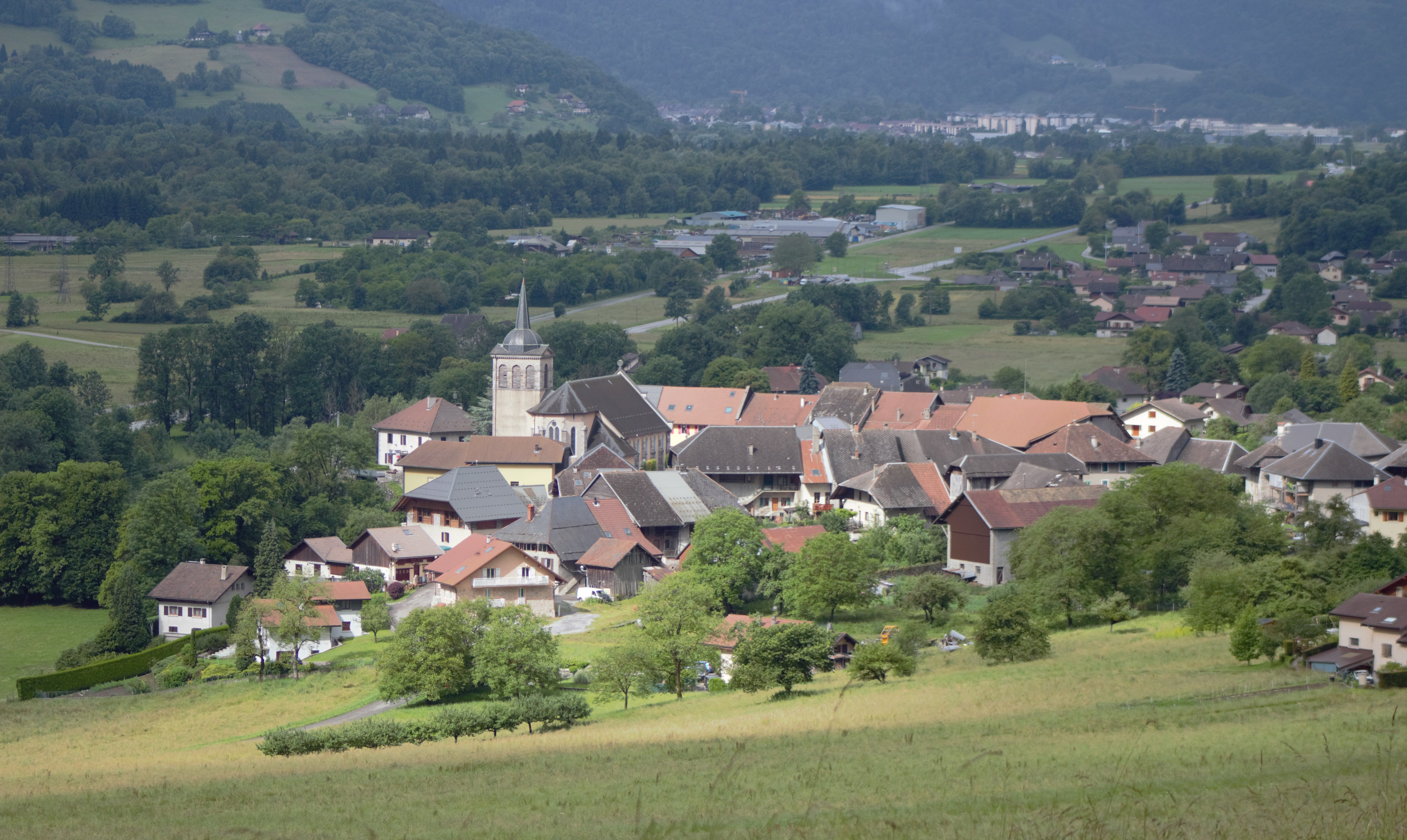 Marlens, Haute-Savoie, France, vue depuis l'Est.